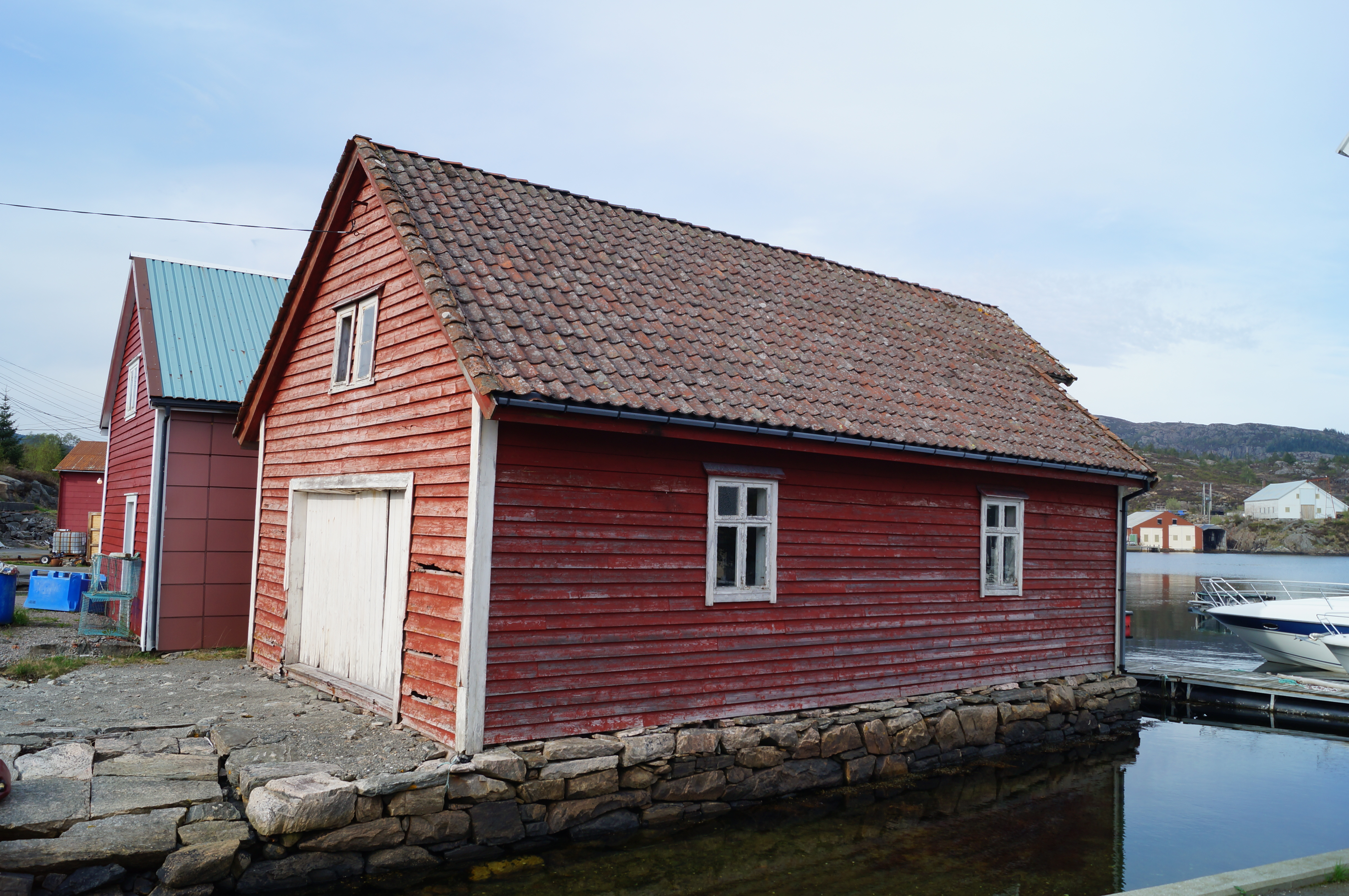 Gamle naust i Forlandsvåg